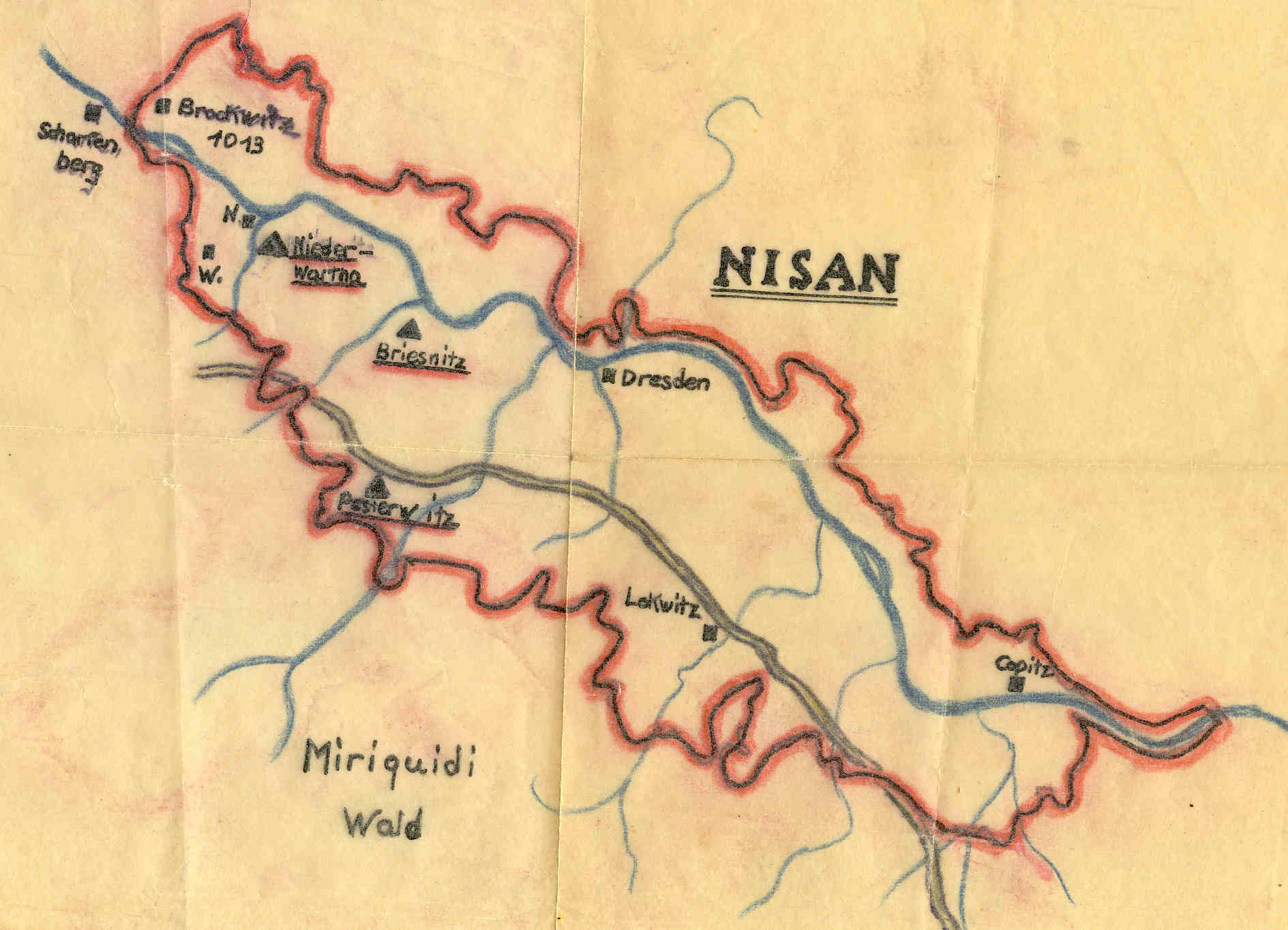 Niederwartha, das Gebiet der Slawen im 8. Jahrhundert